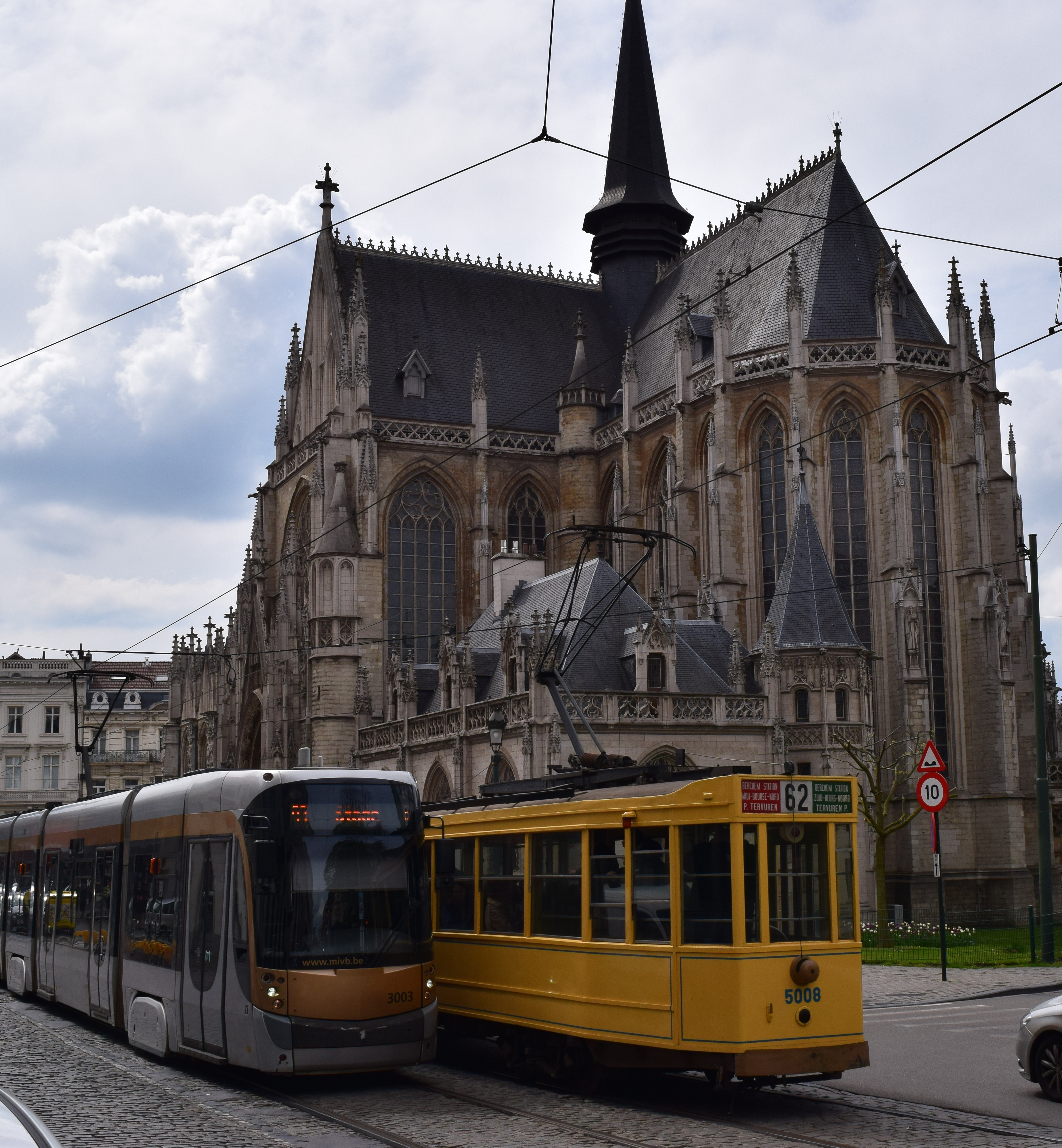 Zavelkerk met de Koningsstraat op de voorgrond.